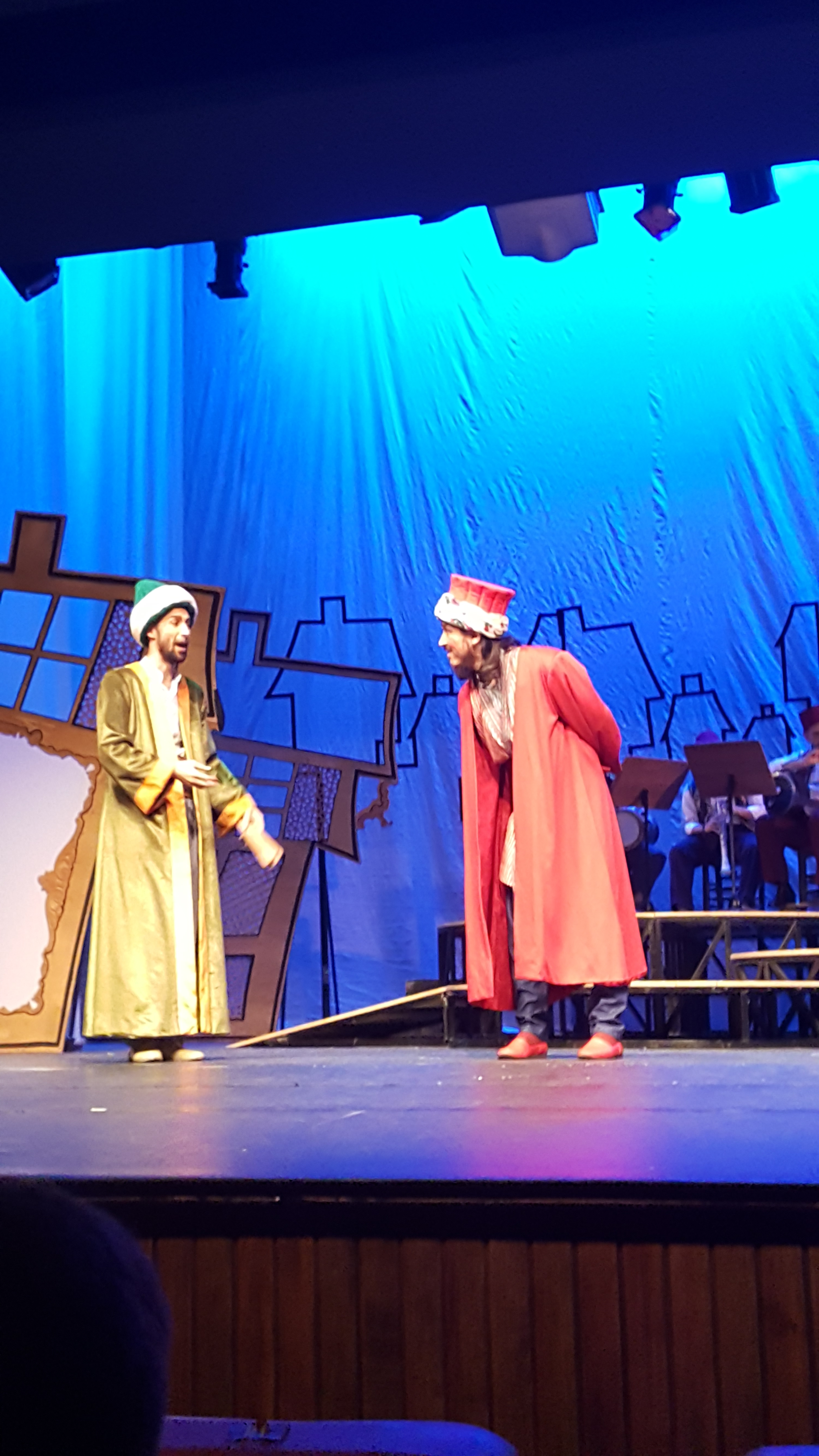 Bursa Devlet Tiyatrosu'nda sahnelenen Akide Şekeri adlı oyunun bir sahnesinde ortaoyunu karakterleri Pişkear ile Kavuklu.